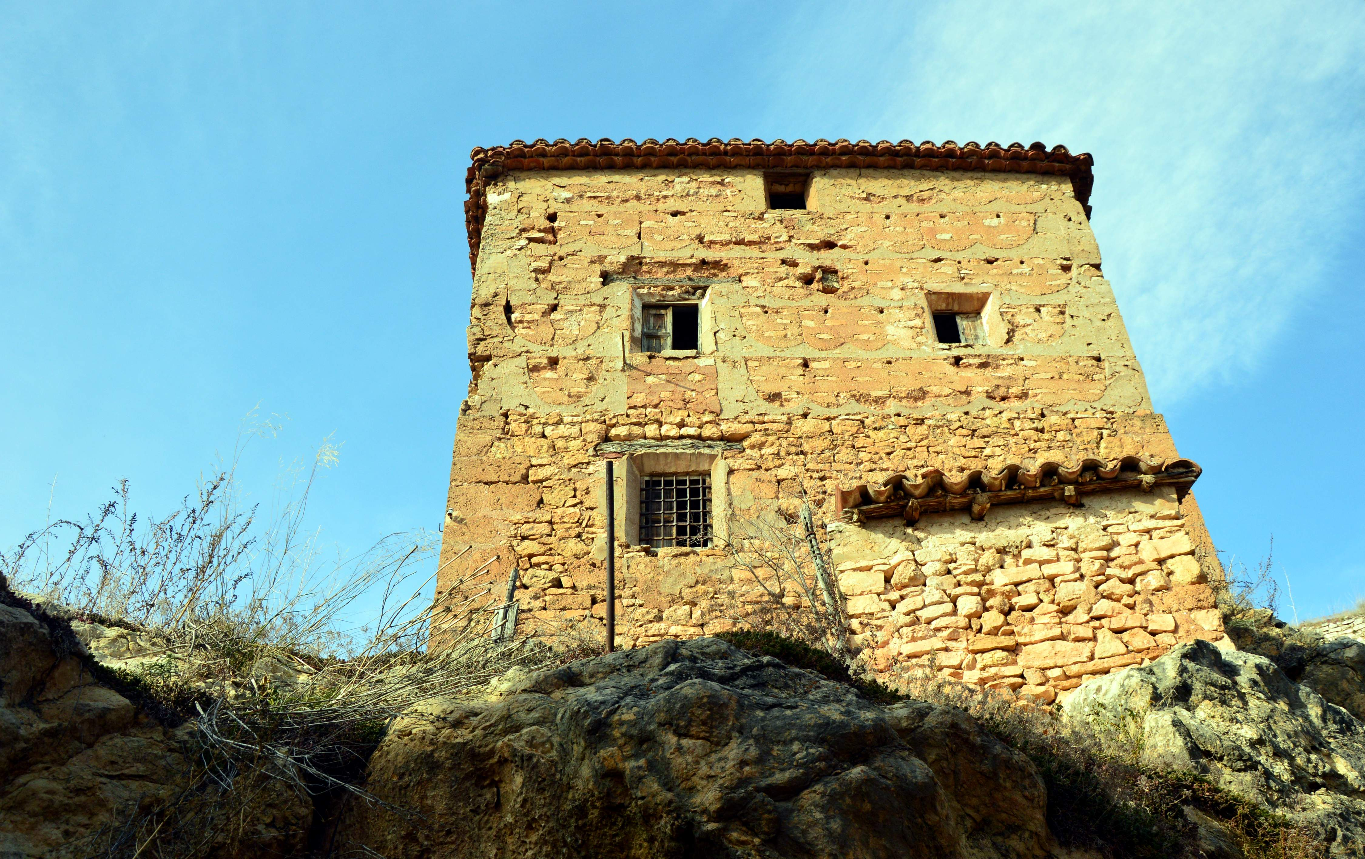 Fachada meridional de la antigua Casa Abadía (Casa del Cura) de Castielfabib (Valencia), situada en el sector suroriental del recinto amurallado (2019).